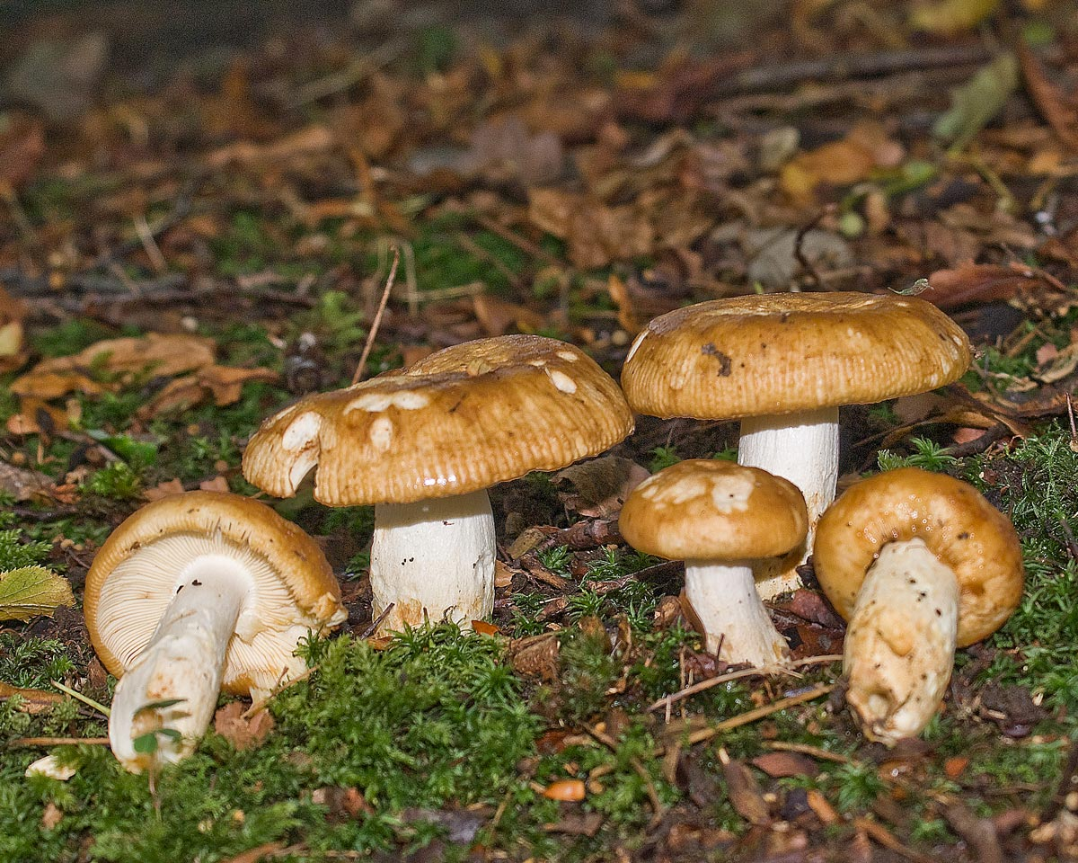 Russula foetens Fr.